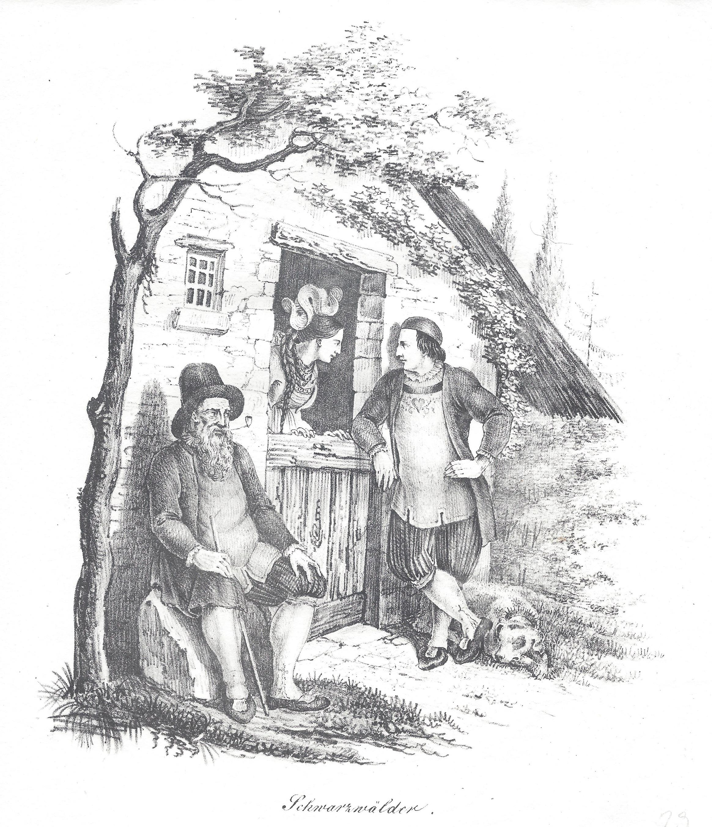 F. D. Seupel bei Godefroy Engelmann: Hauensteiner Idylle, 1829. Fassung mit drei Personen.